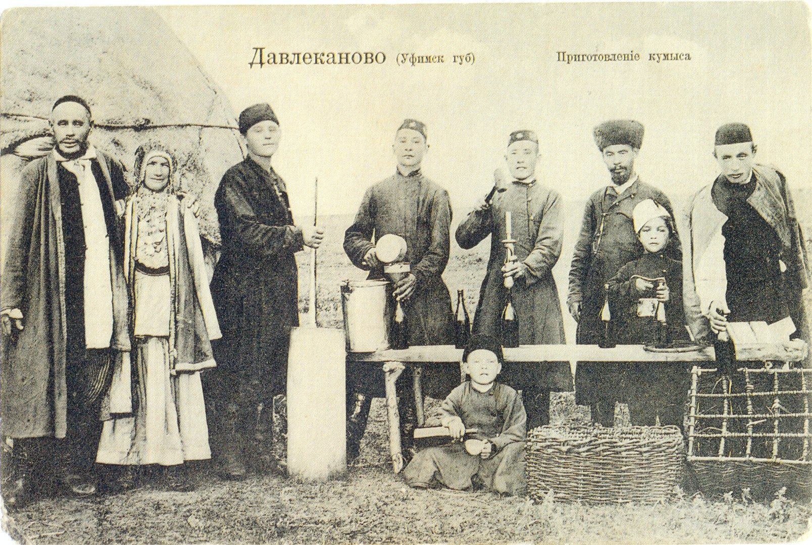 Давлеканово. Кумысники